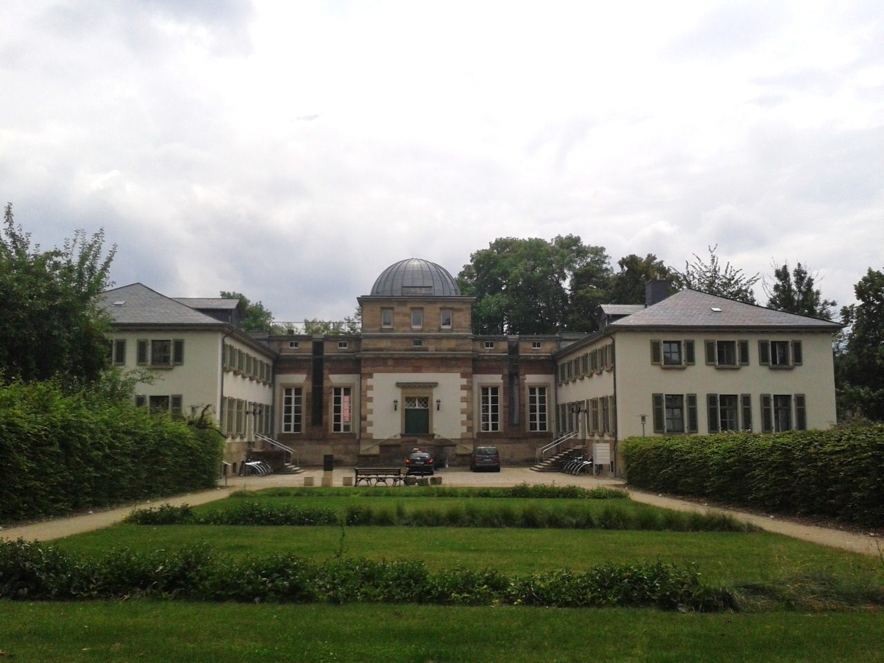 Universitäts-Sternwarte Göttingen vom Eingang zum Gelände an der Keplerstraße (aus Norden)